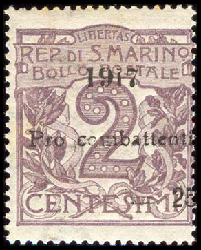 Первая почтово-благотворительная марка Сан-Марино, надпечатка на марке 1903 года